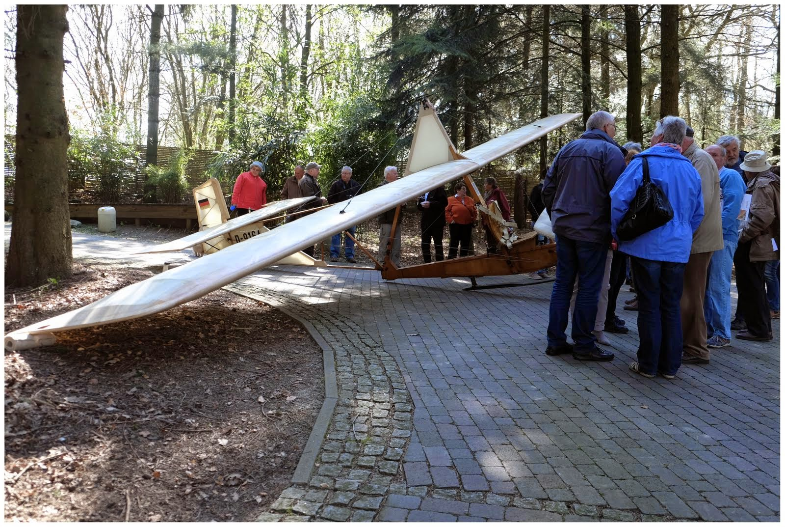 Historische Veranstaltung zur Geschichte des ehemaligen Segelflugplatzes, durchgeführt vom Bergischen Geschichtsverein Abteilung Velbert-Hardenberg am 18. April 2015 auf dem Wallmichrath, originaler Schulgleiter SG 38